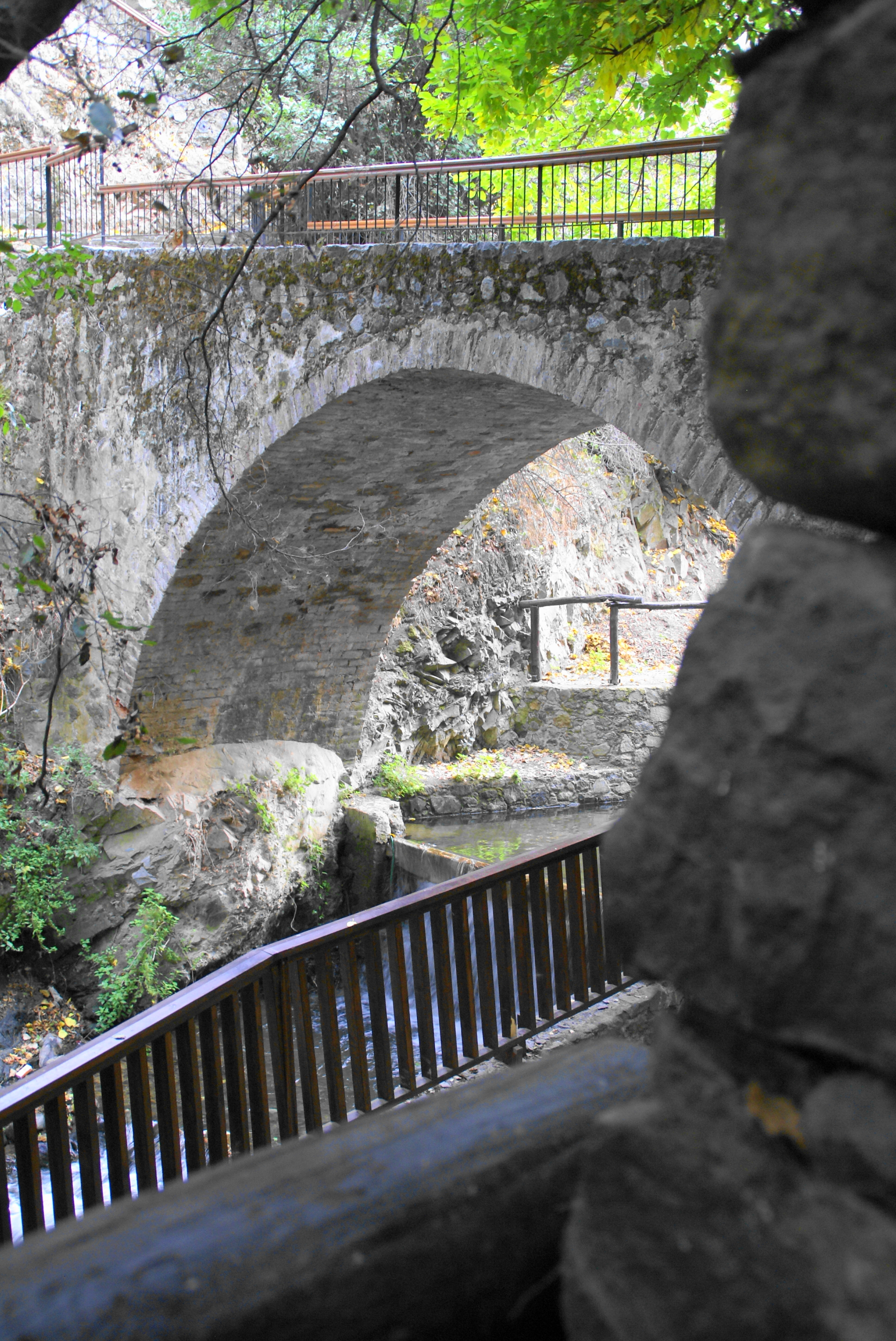 Kakopetria - ein idyllischer Ort im Troodos